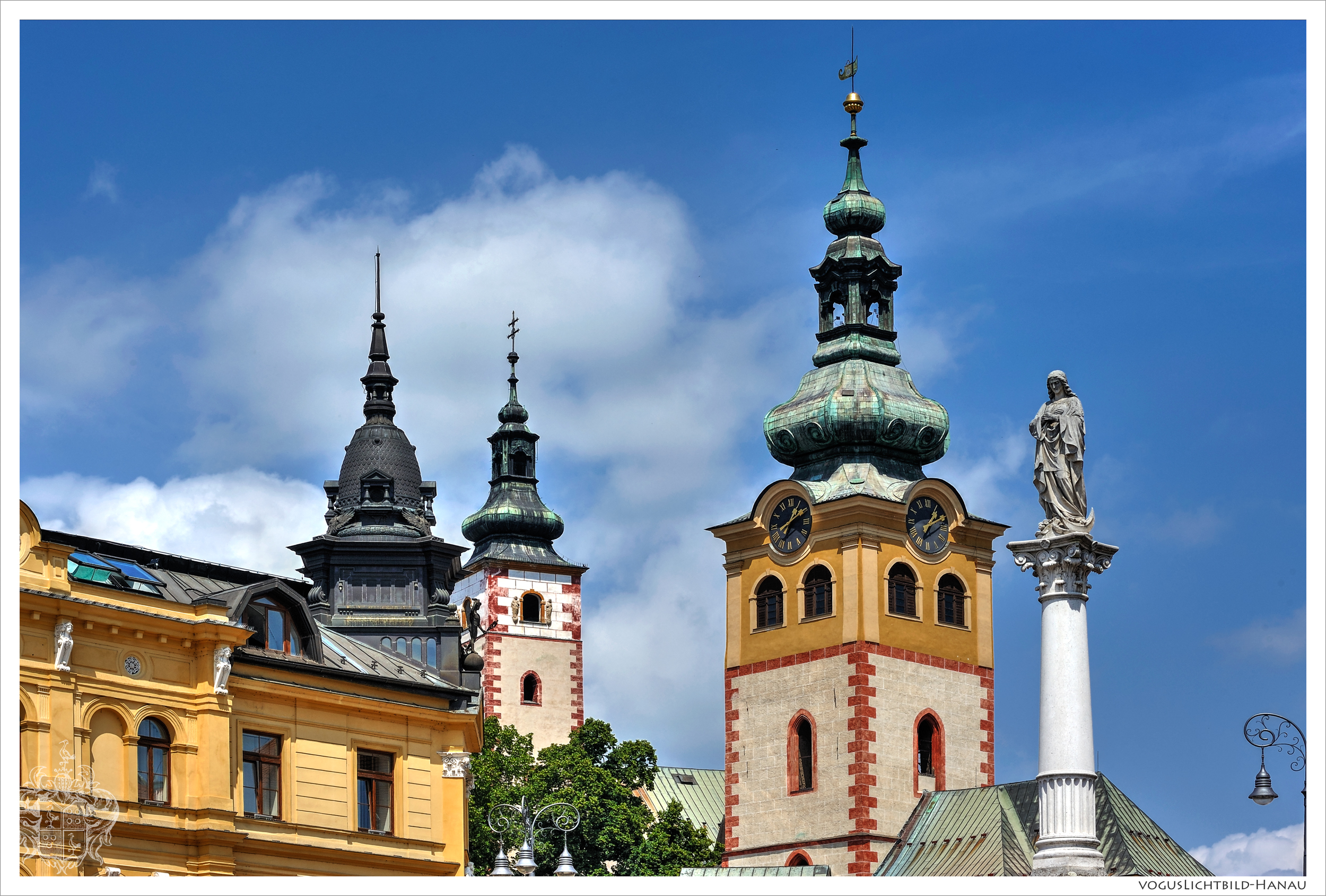 Mariensäule und Uhrturm